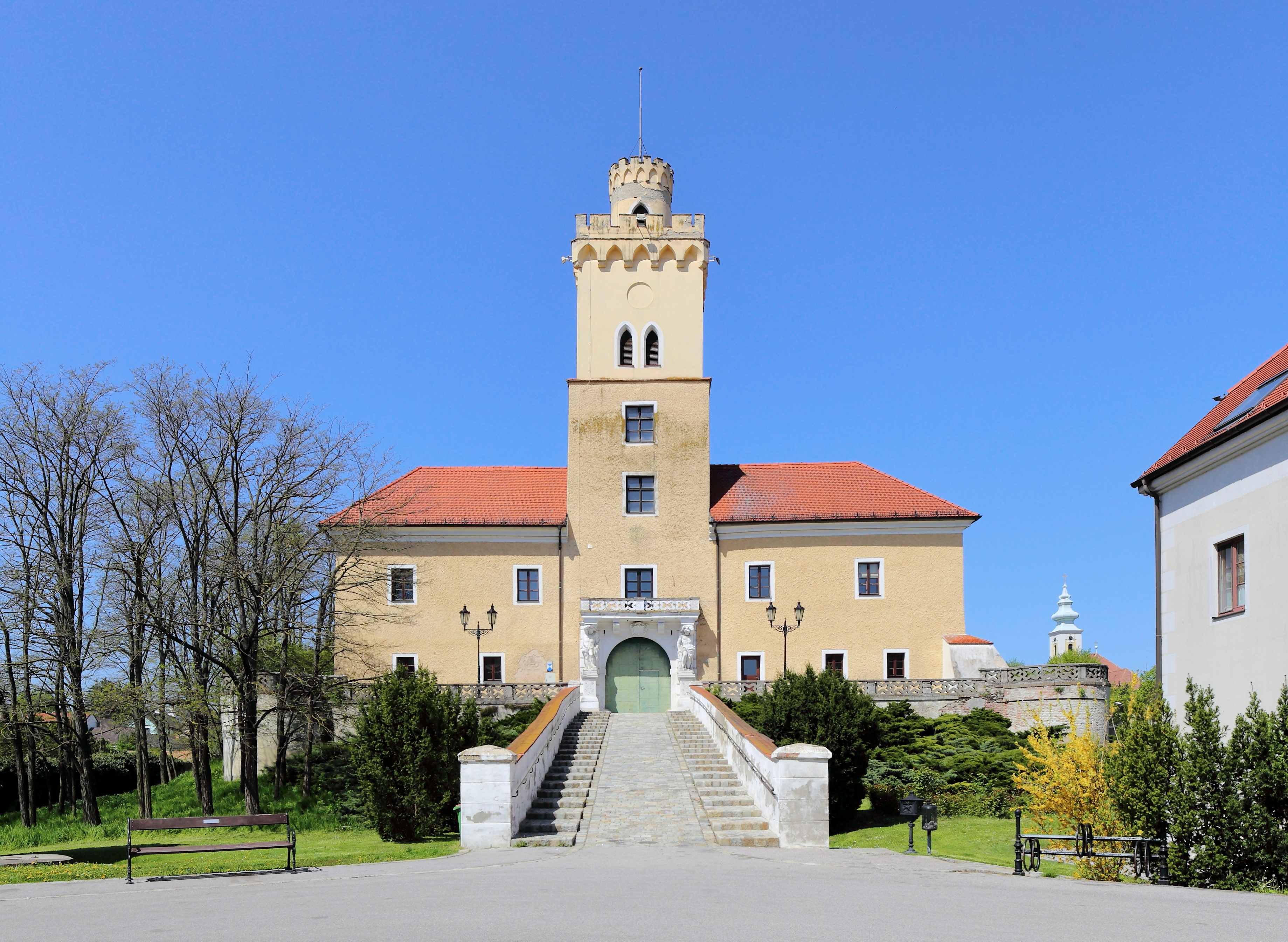 Hauptfassade bzw. Südostansicht des Schlosses in Dürnkrut.Das vierflügige Wasserschloss wurde nach schweren Kriegsschäden in der ersten Hälfte des 16. Jahrhunderts weitgehendst neu errichtet. Der zweigeschossige Renaissancebau um einen quadratischen Hof ist teilweise von einem Wassergraben umgeben. Nachdem das Schloss 1830 in den Besitz der Familie Sachsen-Coburg-Gotha kam, erfolgte eine Neugestaltung des Torturmes; unter anderem mit der romantischen Zinnenbekrönung.